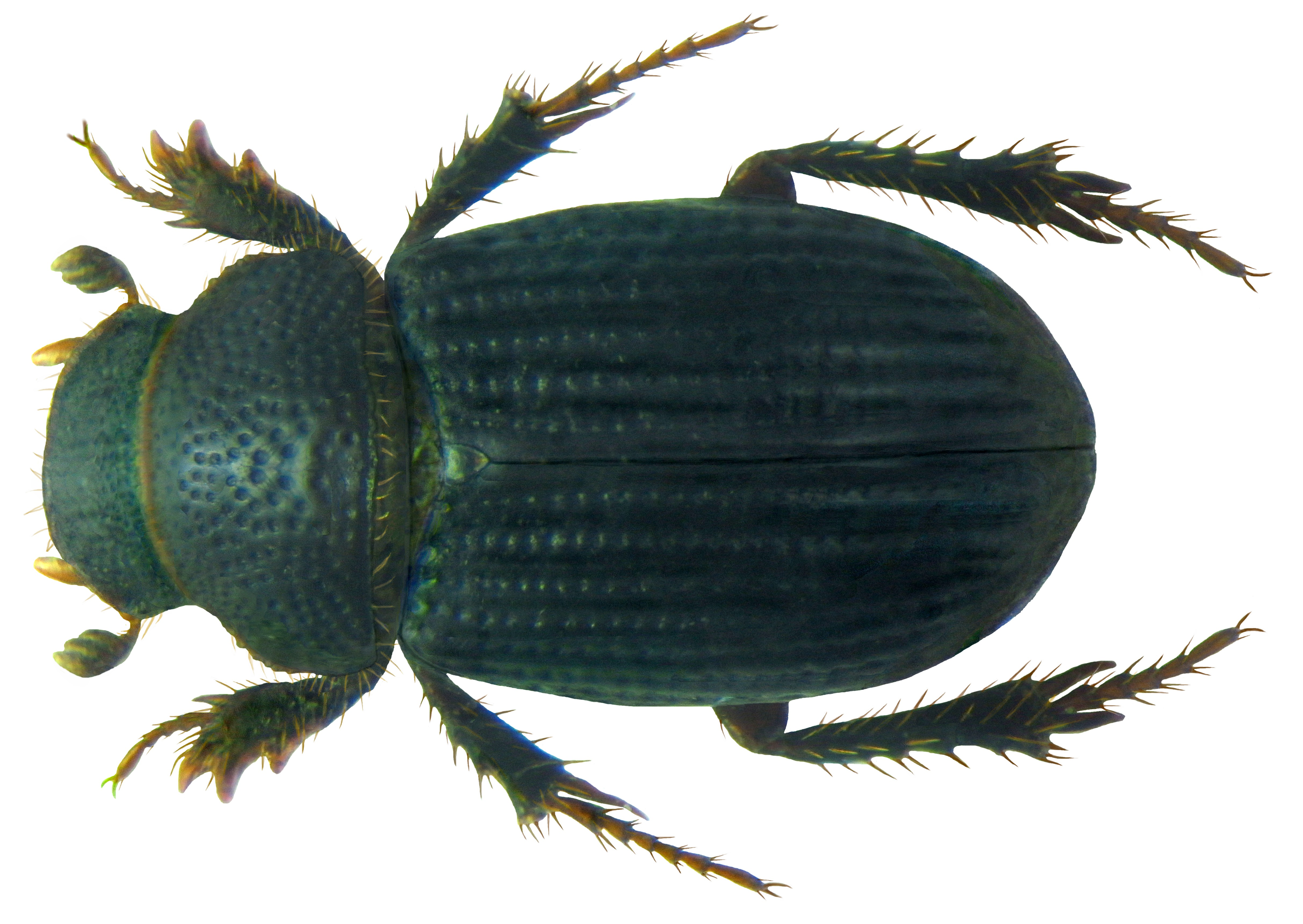 Familie: Scarabaeidae Groesse: 4-5 mm Verbreitung: Nord- bis Mitteleuropa Oekologie: an sandigen Ufern, sporadisch und sehr selten Fundort: Germania, Westfalen, Gronau, Gorbach leg. Köhler, 1992; det. J.Scheuern, 1993 Photo: U.Schmidt, 2011